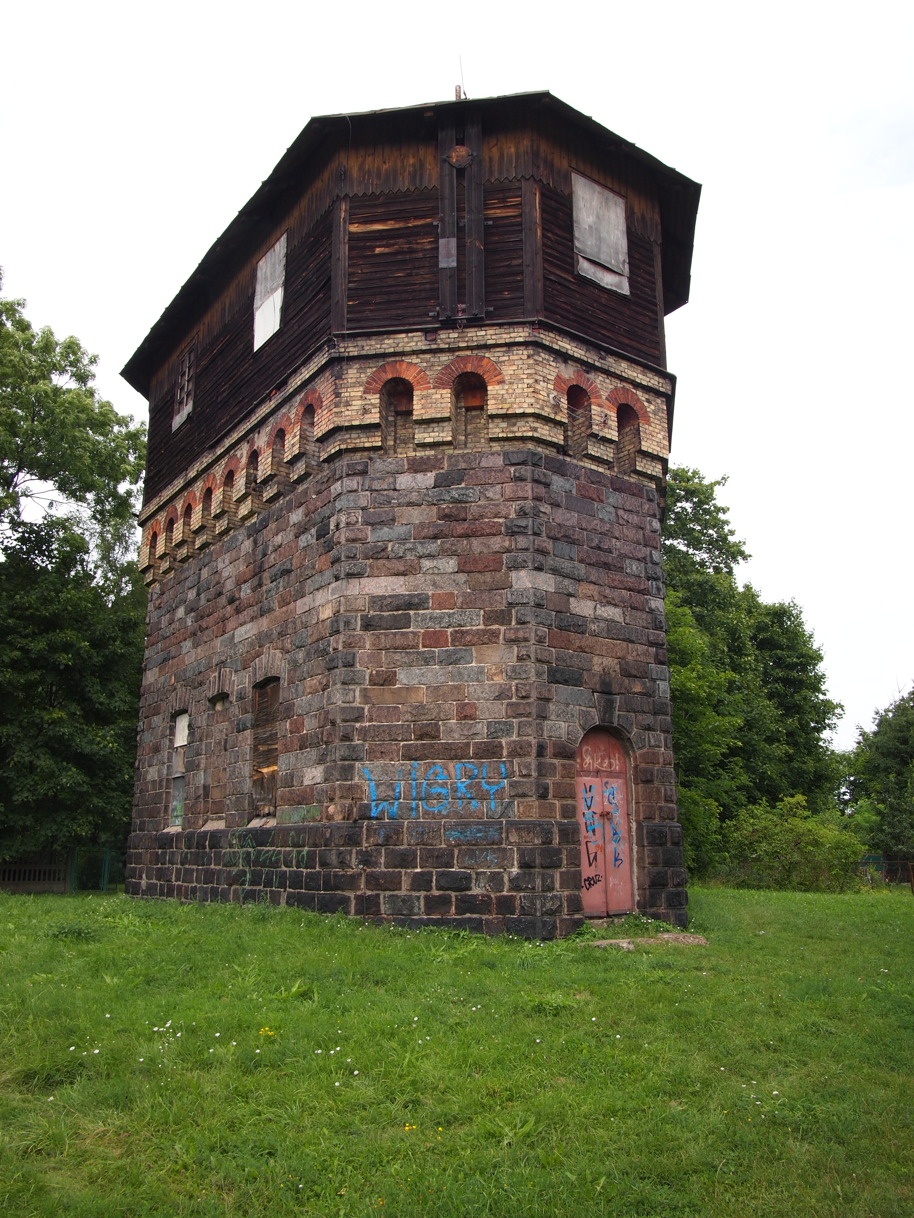 Suwałki, wieża ciśnień. / Suwałki (Poland), water tower.